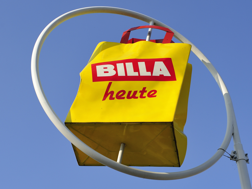 Billazeichen bei einer Filiale in Schwadorf